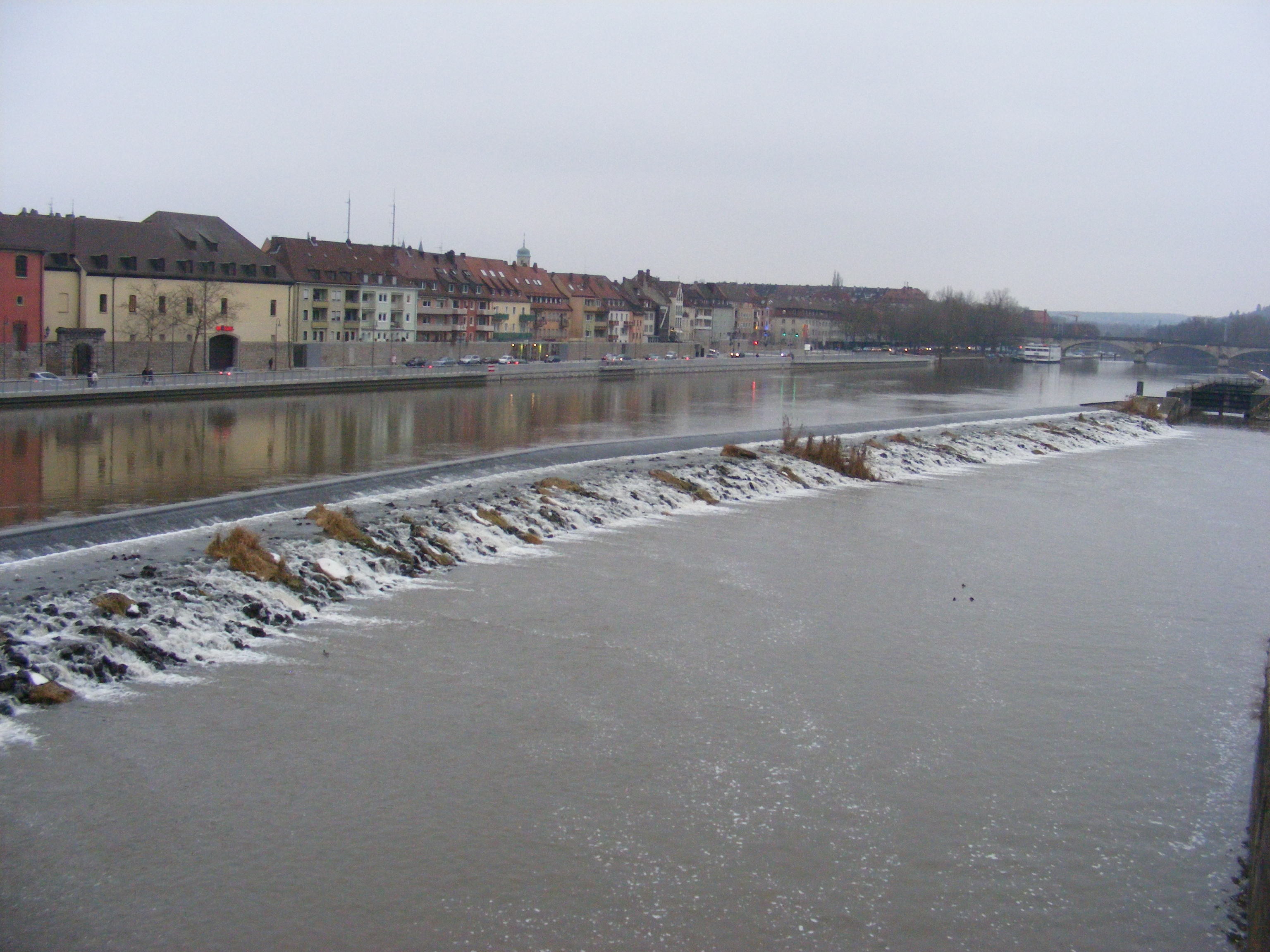 Würzburg